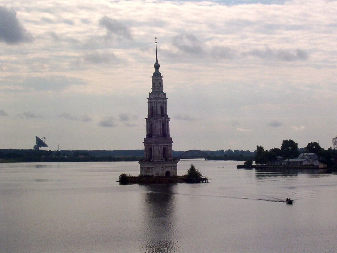 La formazione di grandi laghi artificiali ha sommerso paesi e chiese.